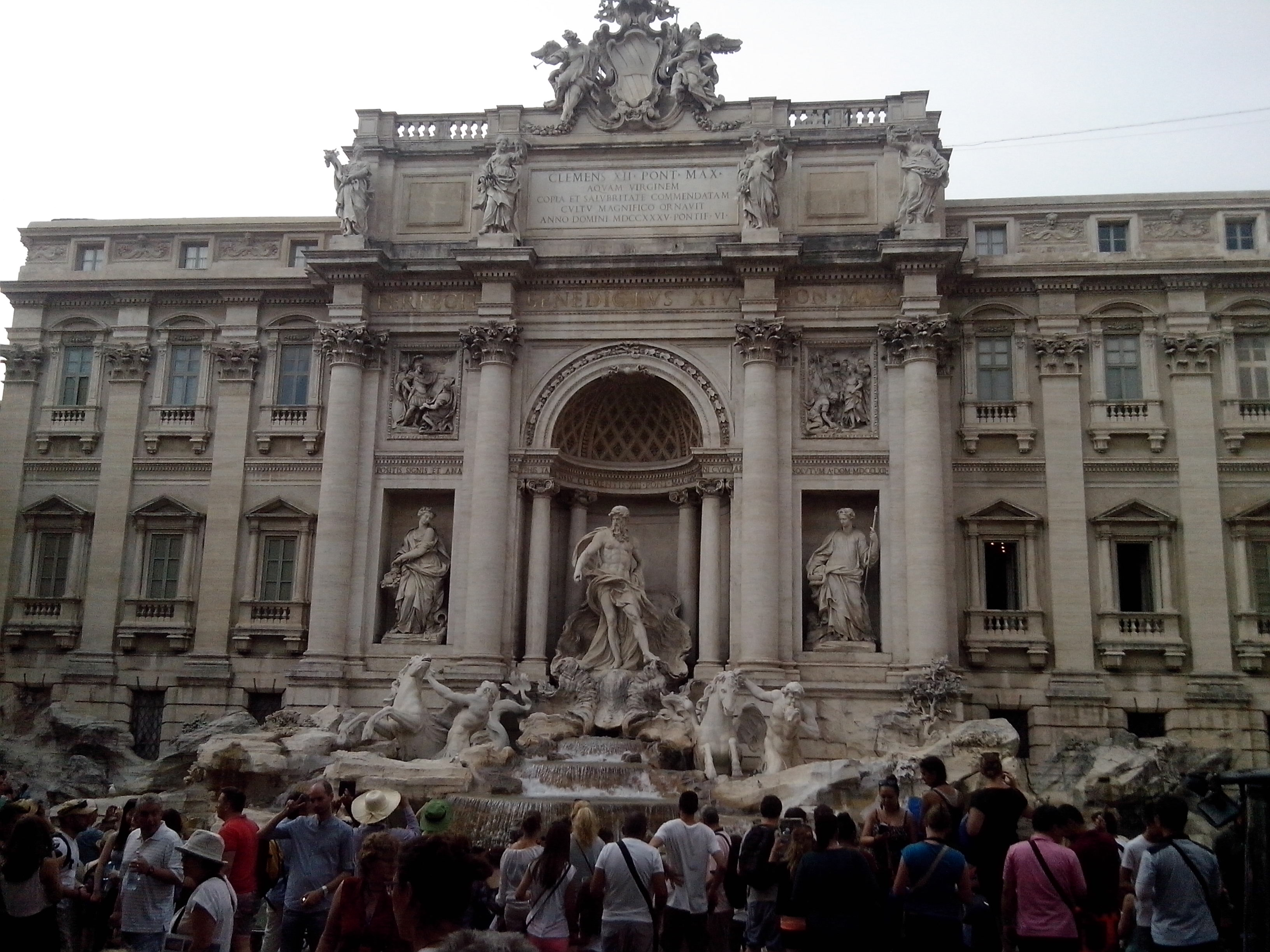 Domina la piazza di Trevi – il cui nome deriva dal trivio che confluisce su piazza dei Crociferi - la celebre fontana di Trevi, che compone uno degli scenari più famosi al mondo, e che rappresenta una delle mete turistiche più visitate della città. La fontana è l'elemento terminale dell'acquedotto Vergine, uno dei più antichi acquedotti romani, tuttora in uso fin dal tempo di Augusto.